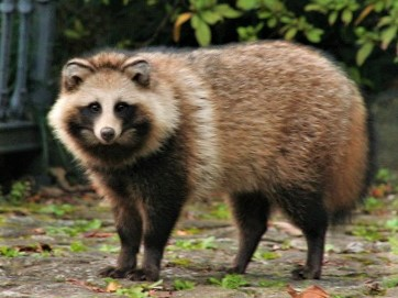 タヌキ